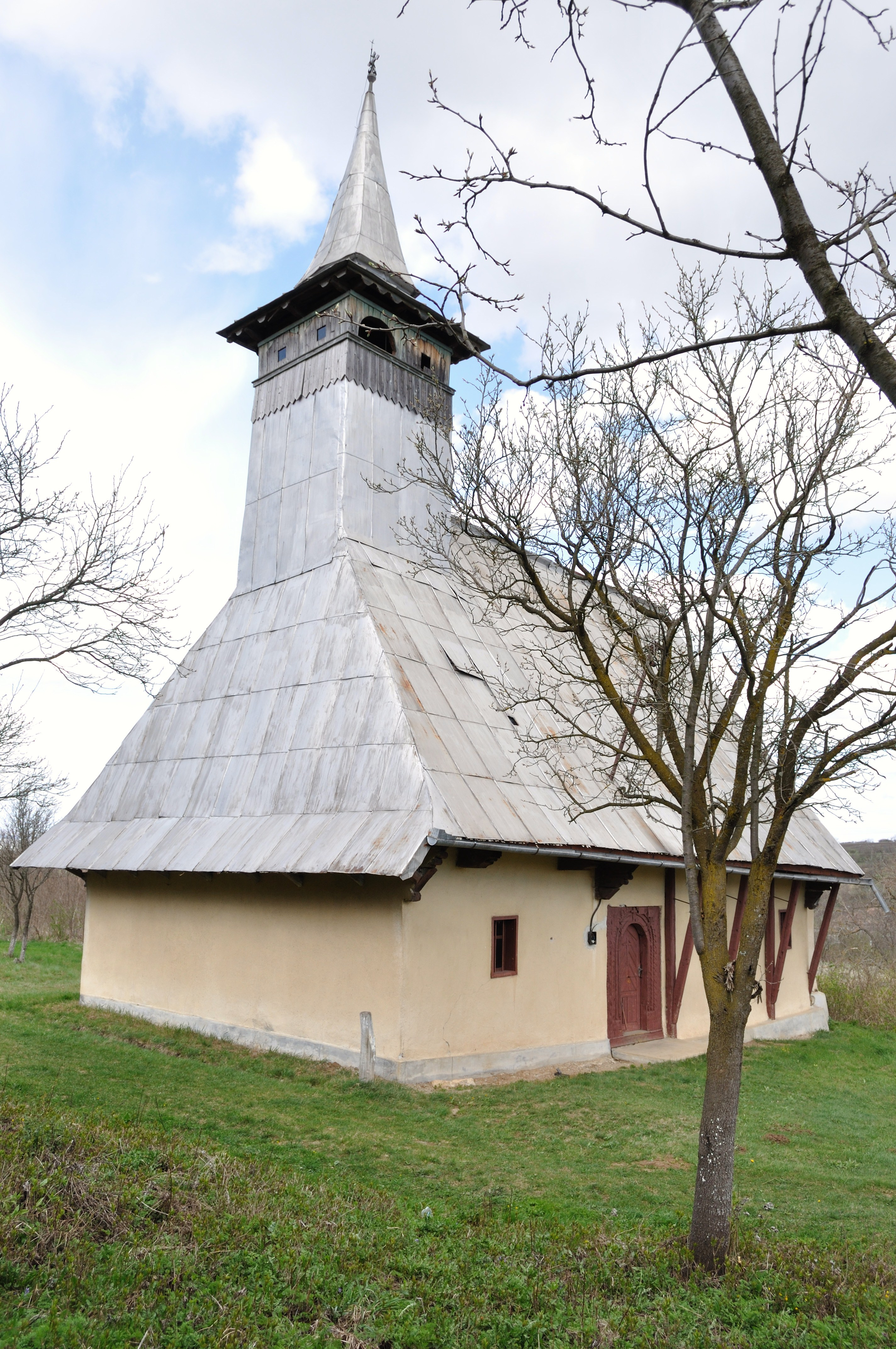 Biserica de lemn „Sfântul Nicolae” din Bădeni, județul Cluj